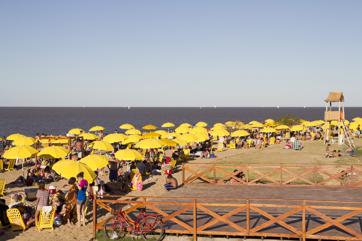 ( Foto: Estrella Herrera)